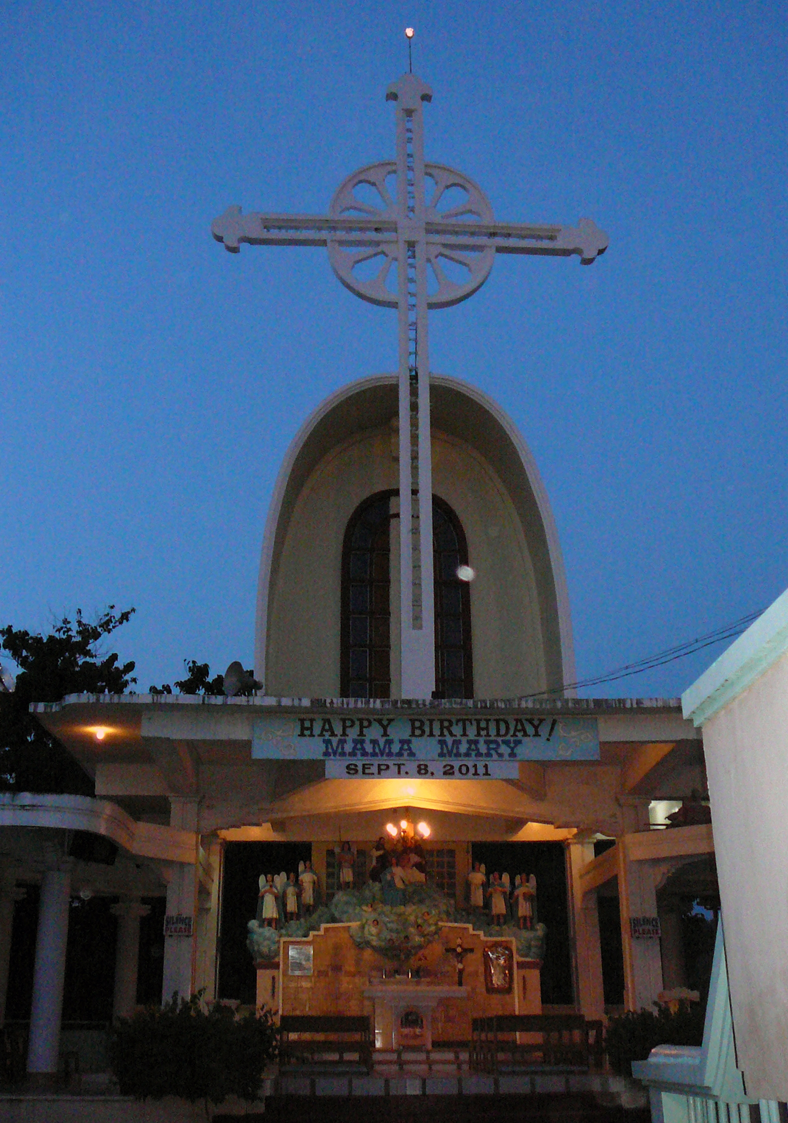 Kapelle neben der Marien-Statue